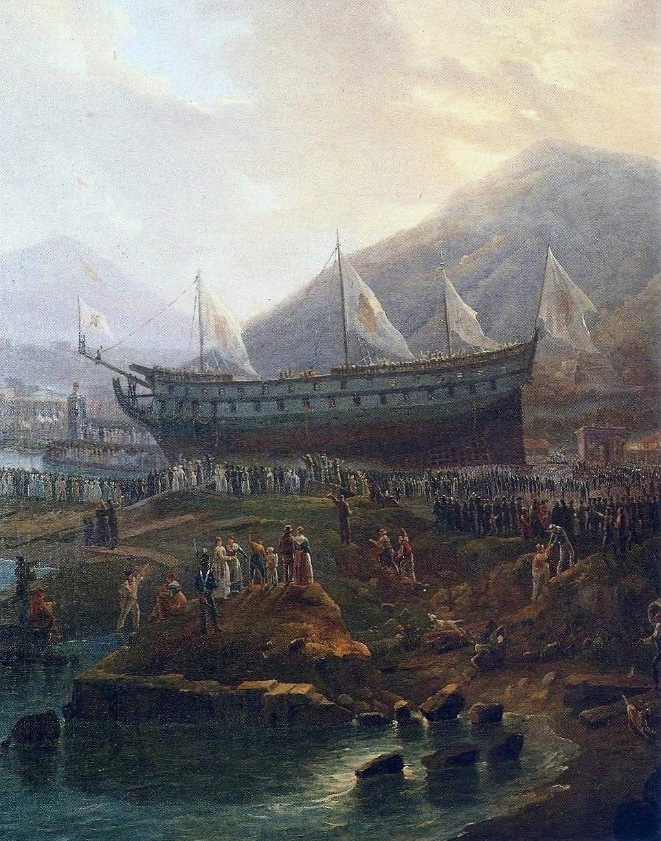 Il varo del vascello Vesuviotitle QS:P1476,it:"Il varo del vascello Vesuvio"